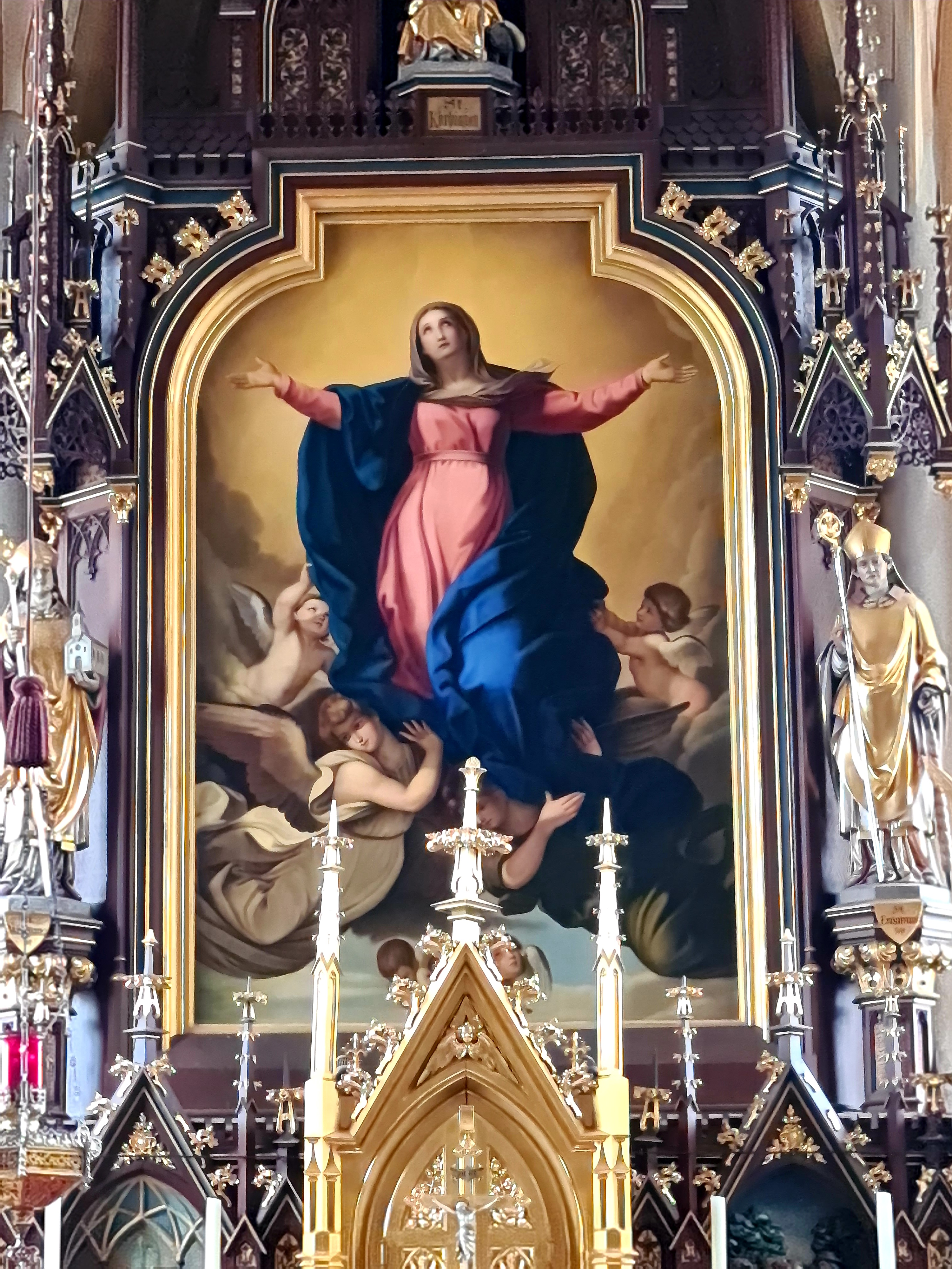 St. Korbinian (Rechtmehring)